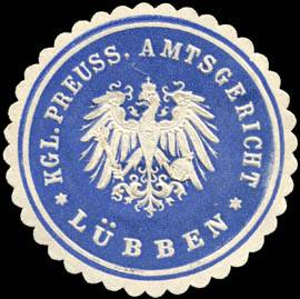 Siegel Kgl. Preuss. Amtsgericht Lübben